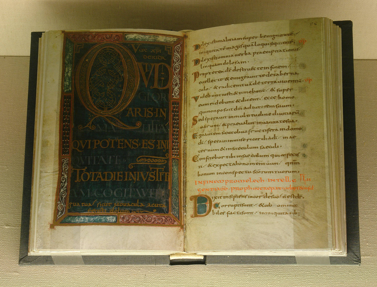 Dom-Museum Bremen: Nachbildung des Dagulf-Psalter (Goldener Psalter). Original ist um 790 an der Aachener Hofschule entstanden und war vom 11. Jh bis 1648 am St. Petri-Dom in Bremen